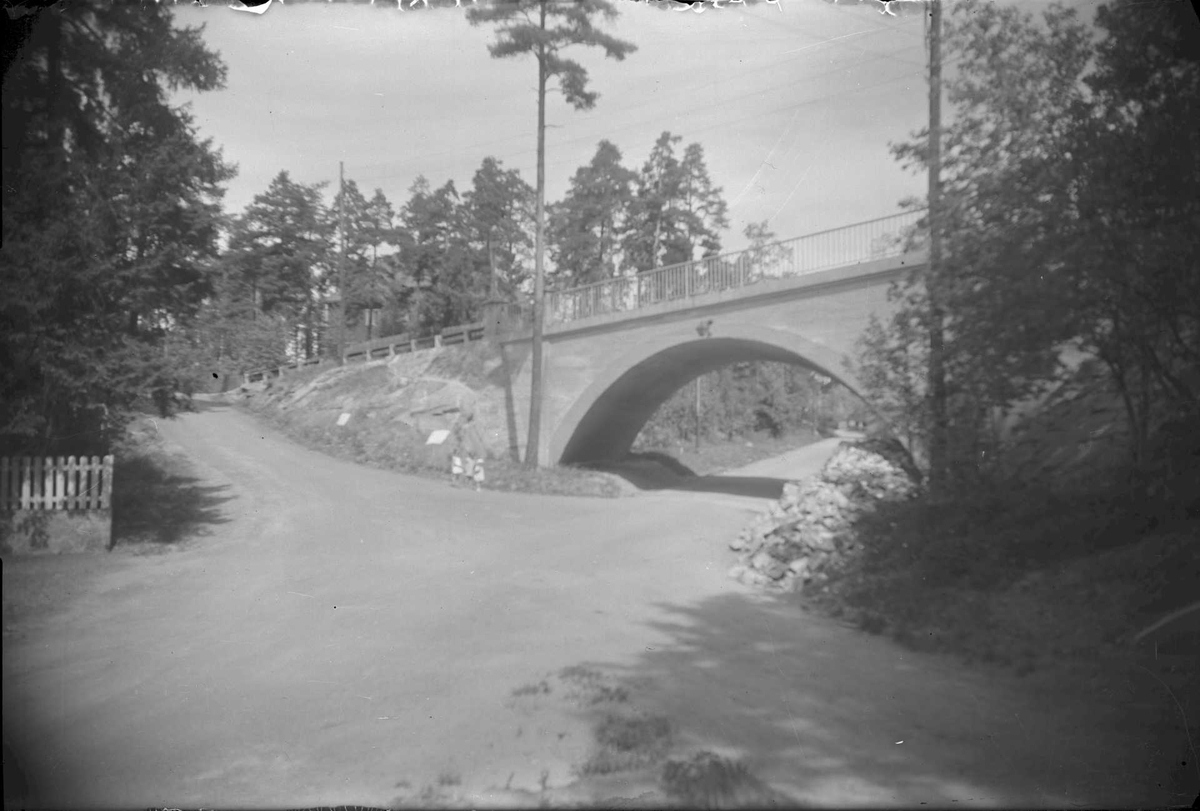 Kastellveien i Oslo, der Solveien krysser i bru.